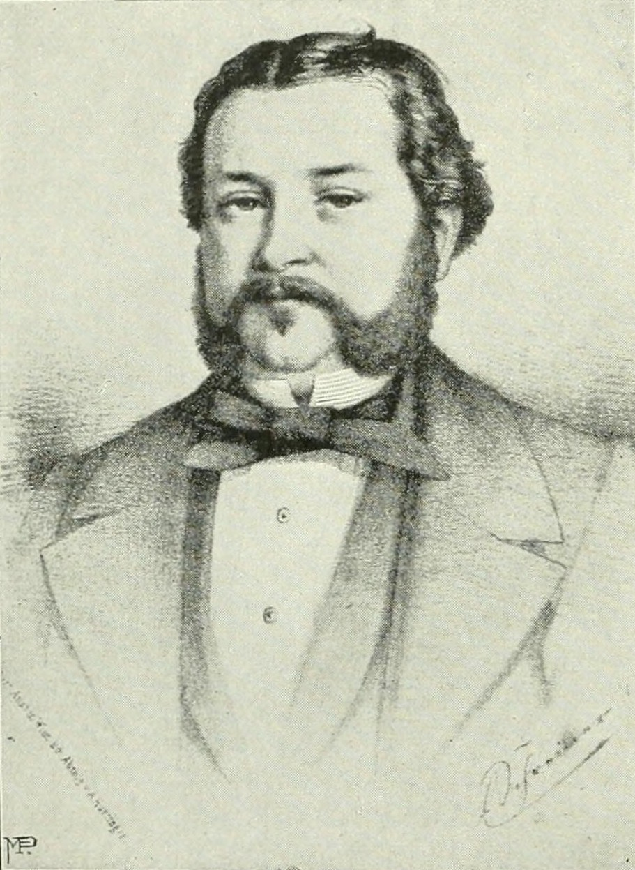 In: Berühmte israelitische Männer und Frauen in der Kulturgeschichte der Menschheit ; Lebens- und Charakterbilder aus Vergangenheit und Gegenwart ; ein Handbuch für Haus und Familie. Leipzig-1901. Reudnitz : A. H. Payne, 1900, S. 48